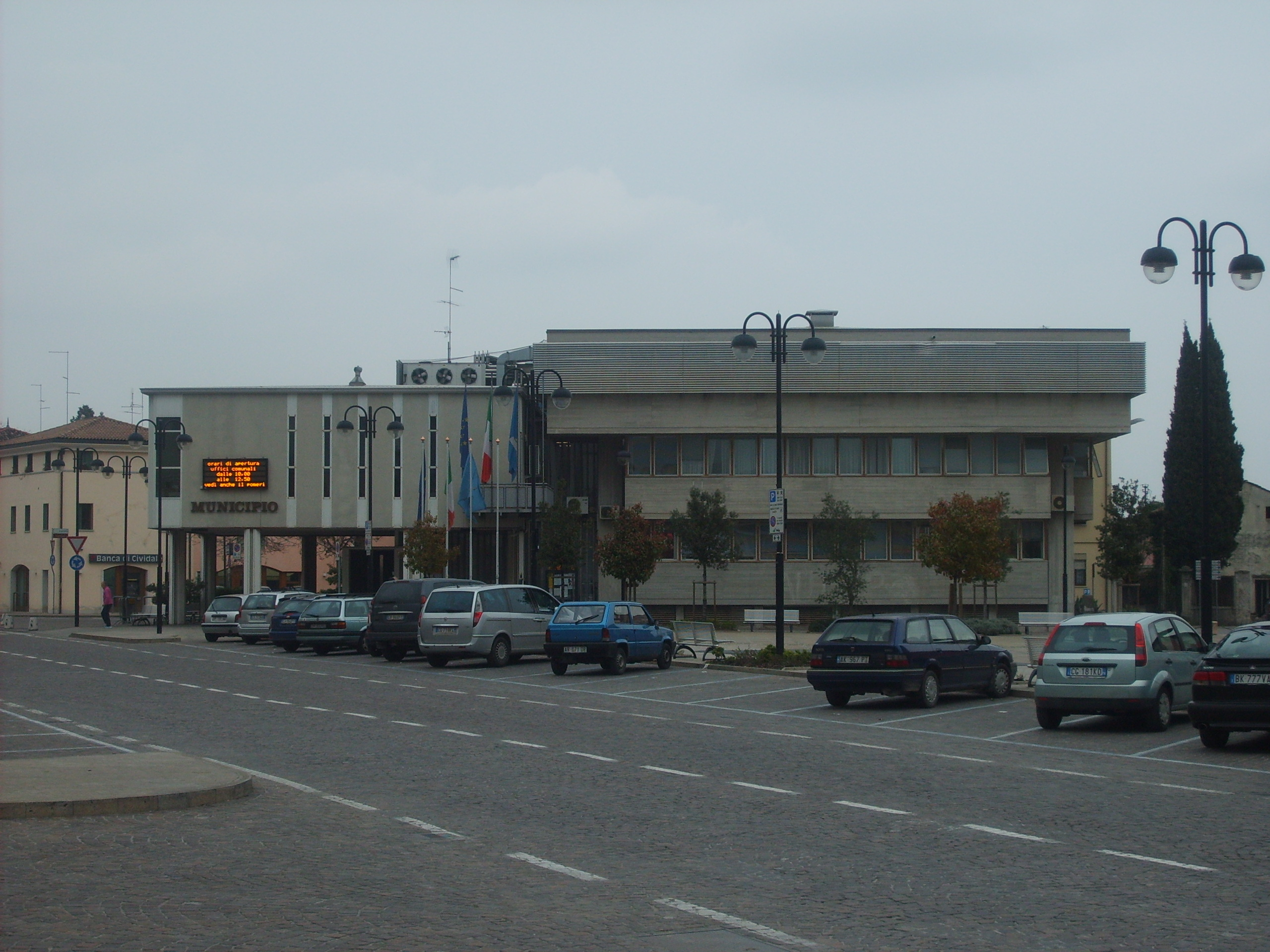 Municipio di Cordenons